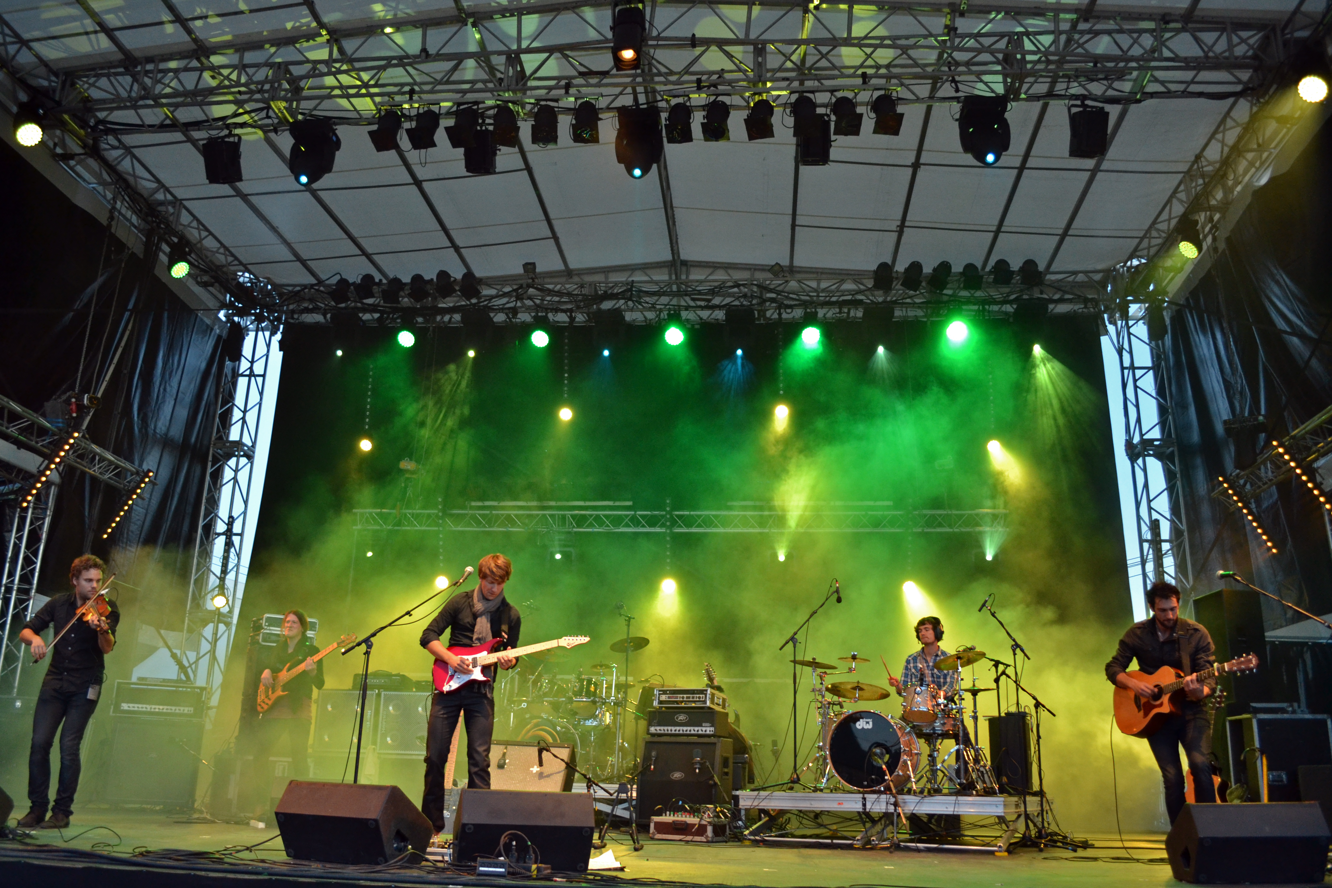 Julien Jaffrès en concert au festival de la Saint-Loup à Guingamp le 12 août 2013.